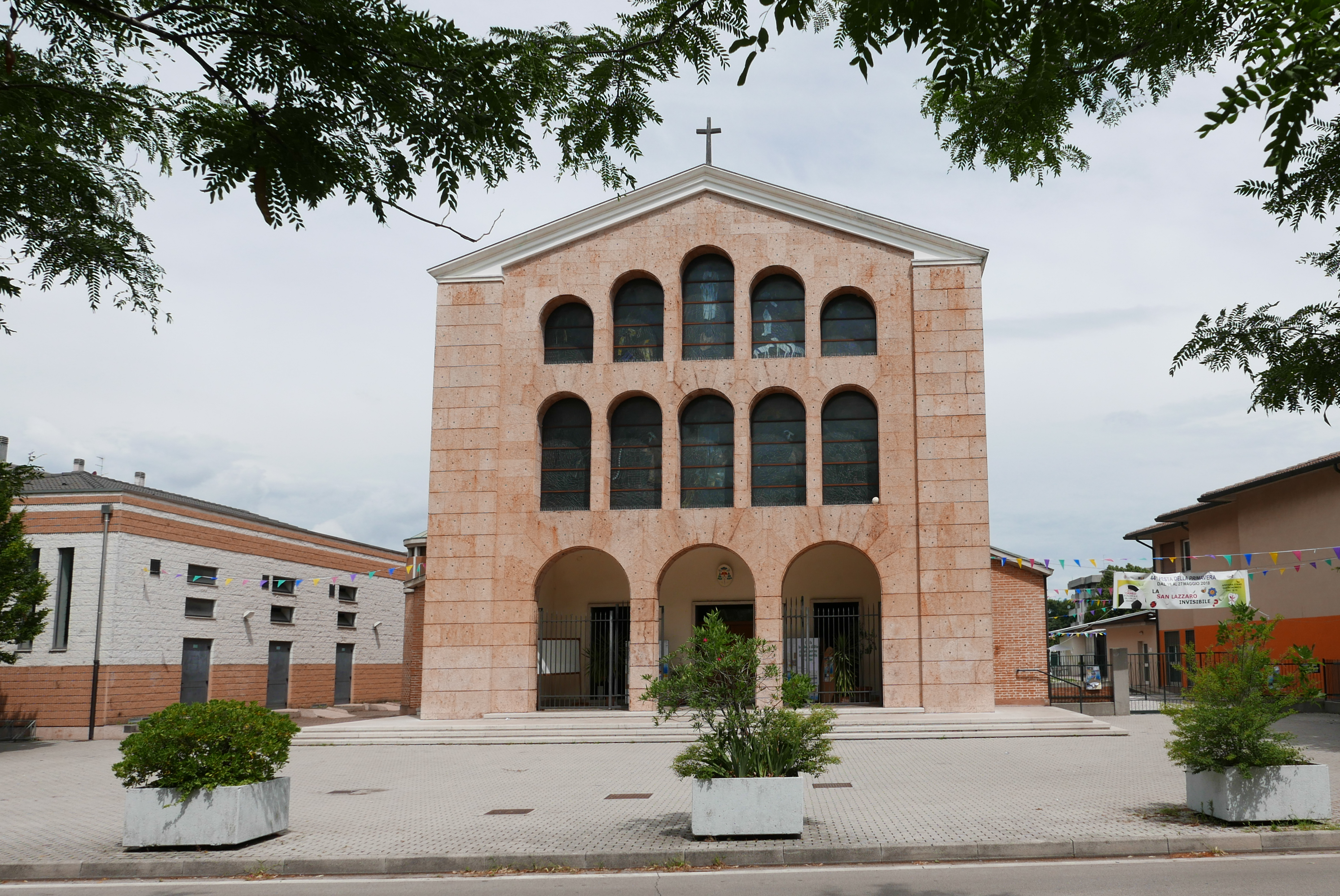 Chiesa parrocchiale della Sacra Famiglia, a San Lazzaro a Vicenza